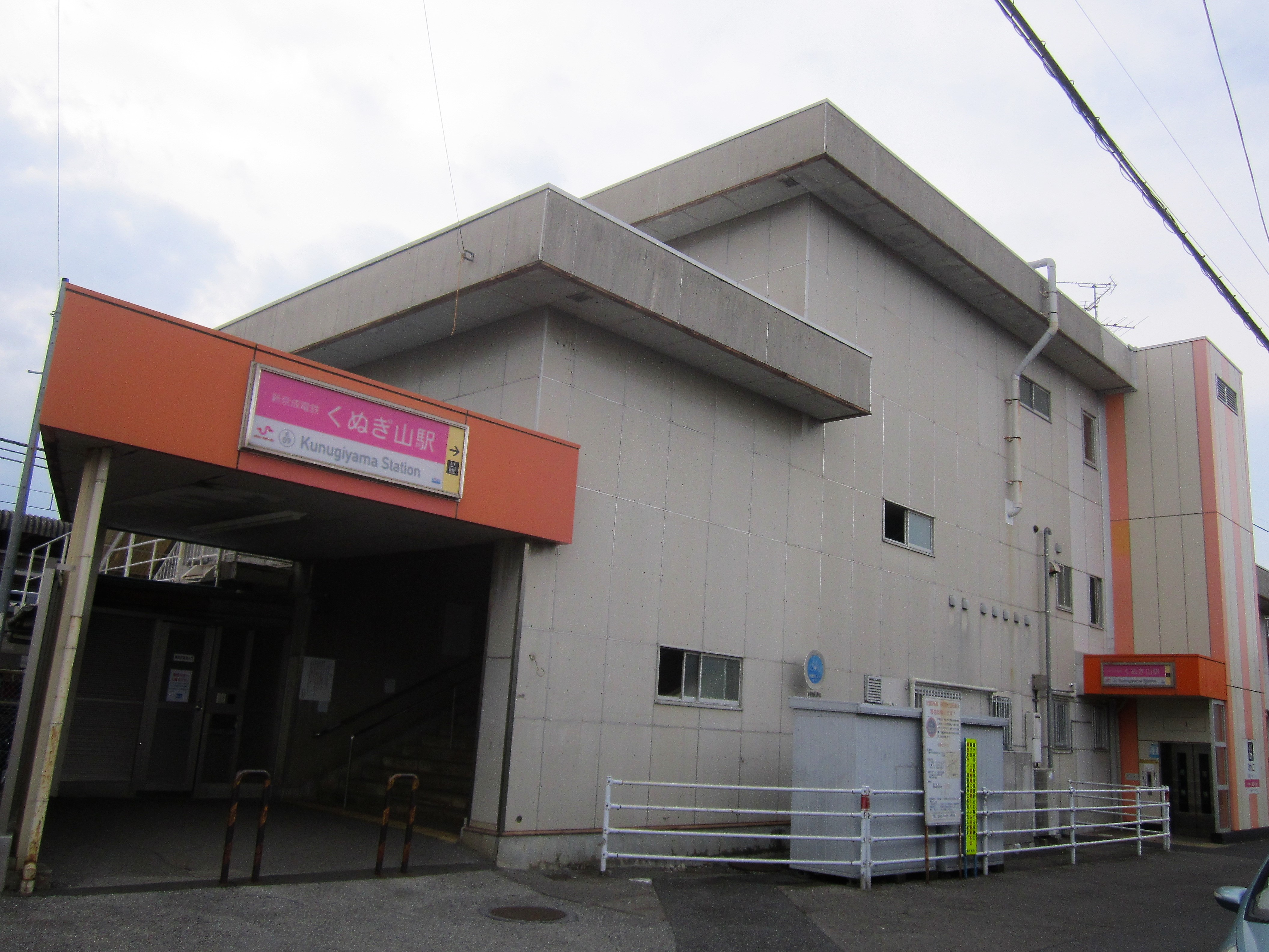 くぬぎ山駅東口（2020年6月） Canon PowerShot A2200